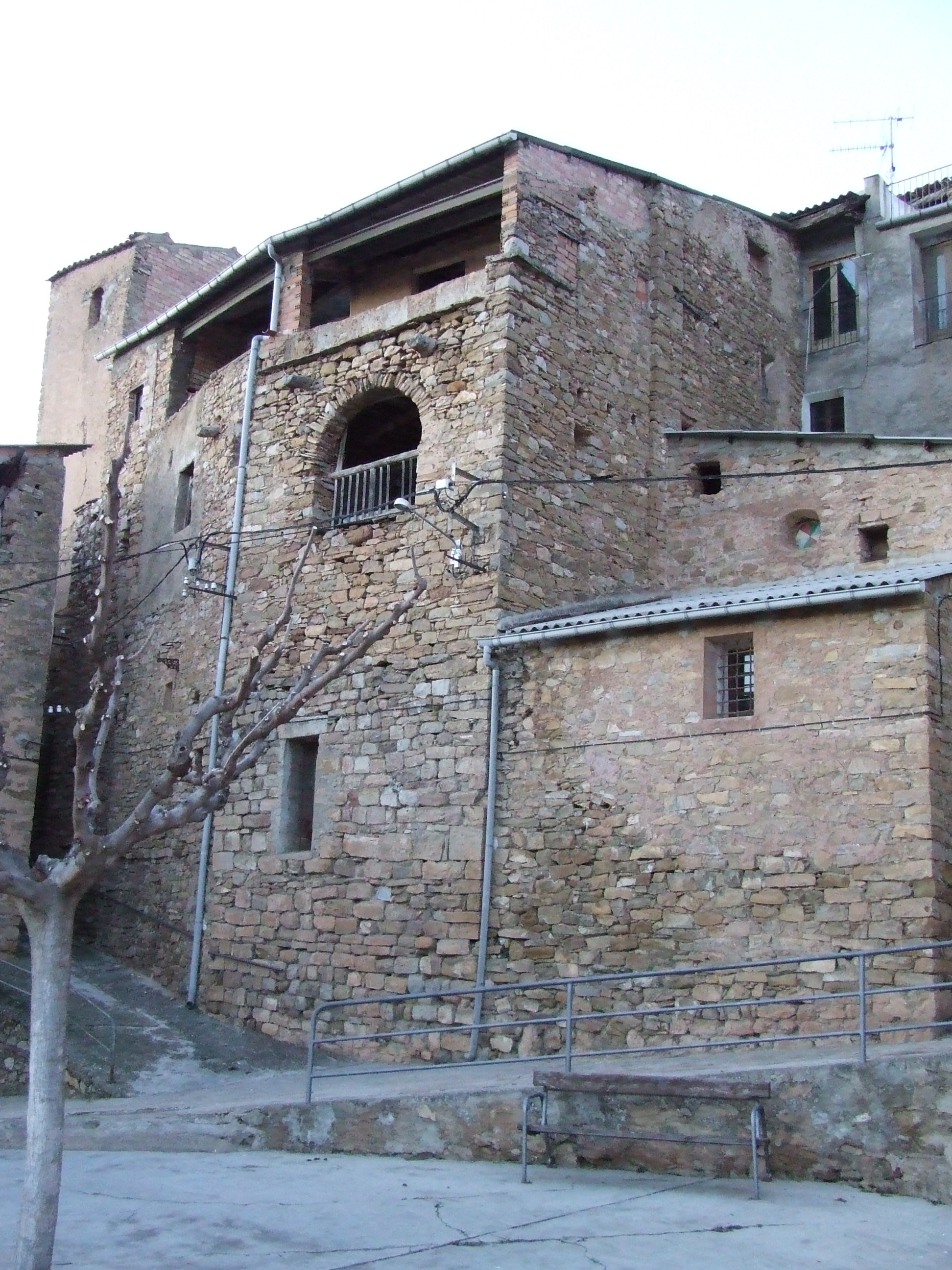 Part meridional de Sant Serni de Suterranya (Tremp, Pallars Jussà)